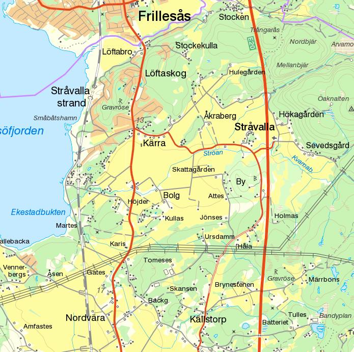 Frillesås, Sjöaremossen (karta).